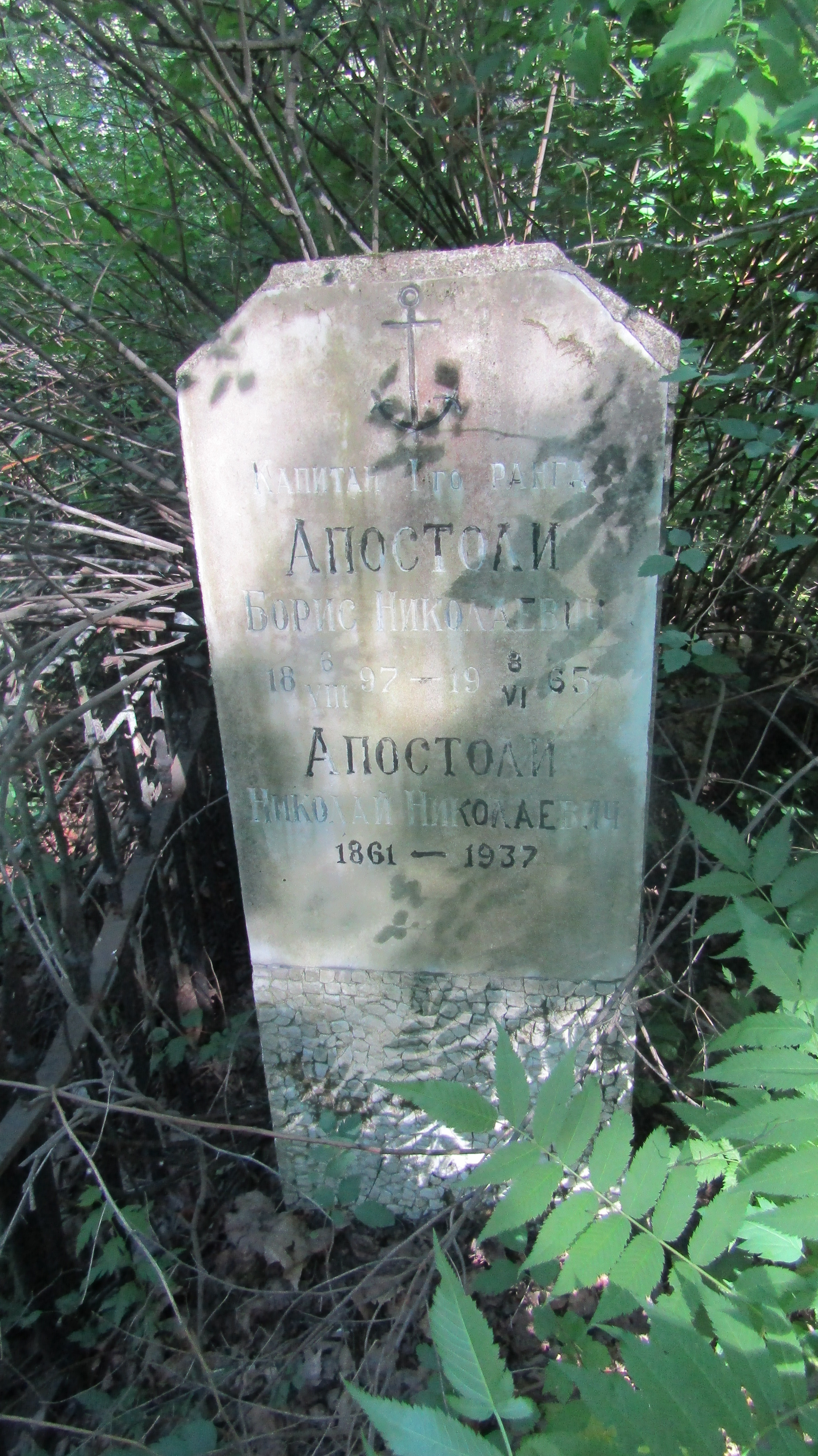 Могила Апостоли Б.Н. Богословское кладбище, Санкт-Петербург.